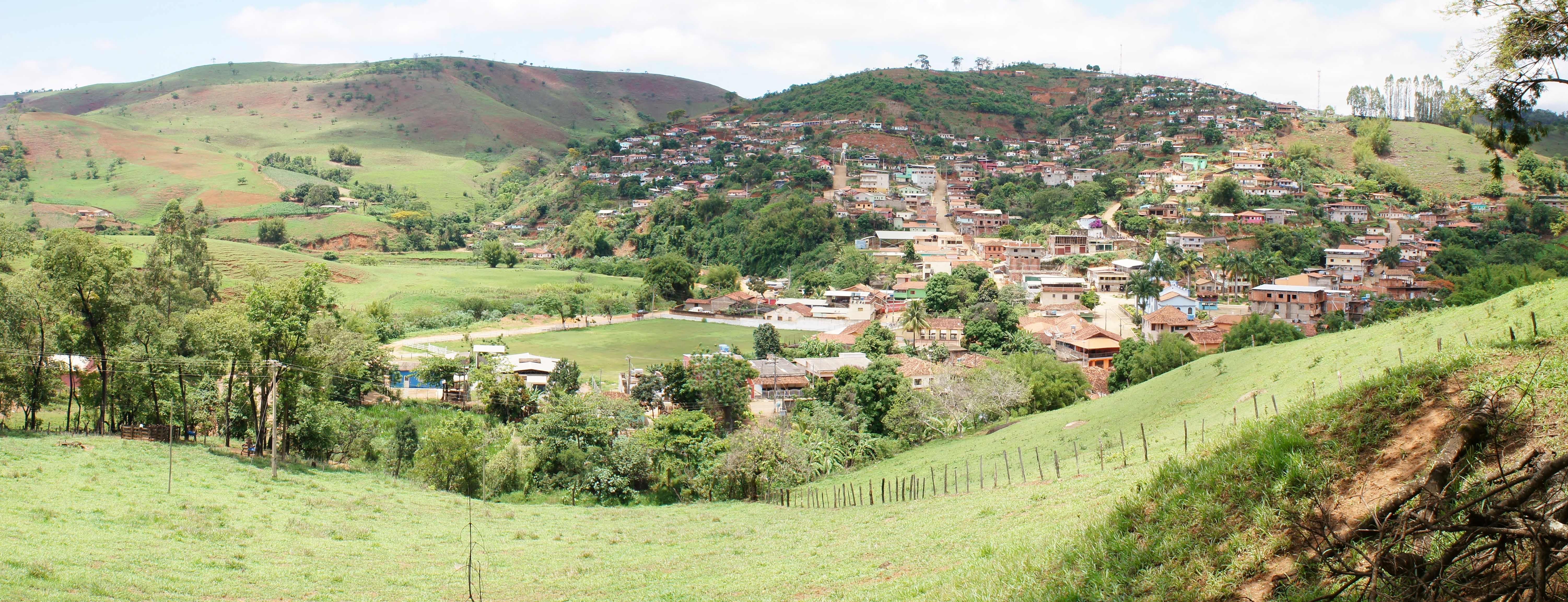 Sem Peixe